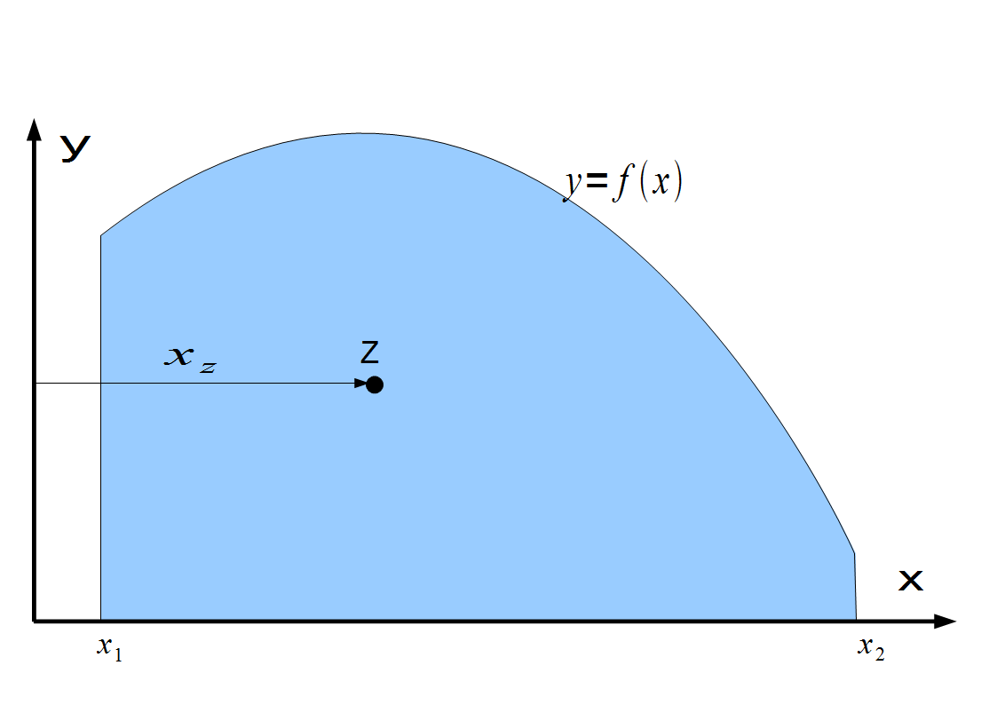 Zwaartepunt van een oppervlak bepaald door een functie